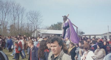 Procesión del Jesús Nazareno de Cahuach (30 de agosto del año 2000). Autor: Roberto Bahamonde Lugar: Cahuach (Quinchao), Chiloé, Chile Fecha: 30/08/2000